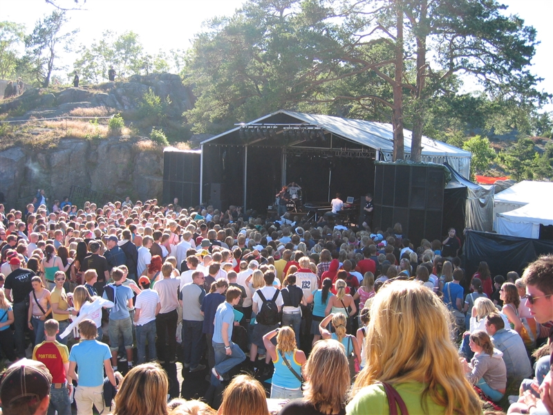 Keane opptrer på Odden under Quartfestivalen 2004.